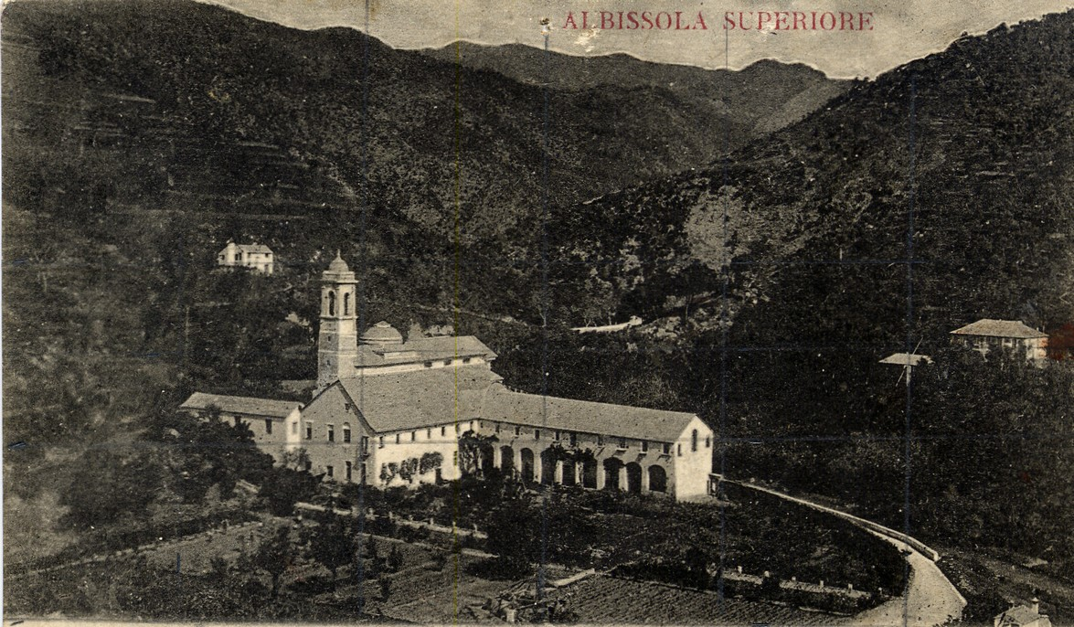 La più antica foto del Santuario e del Convento